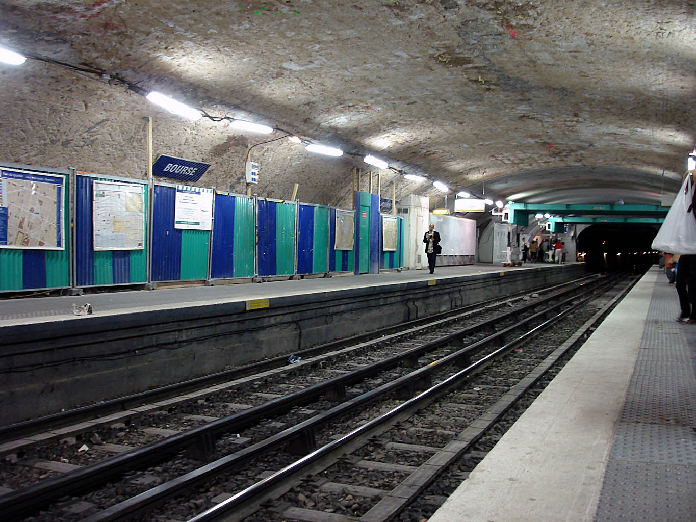 La station Bourse de la ligne 3 du métro de Paris, France